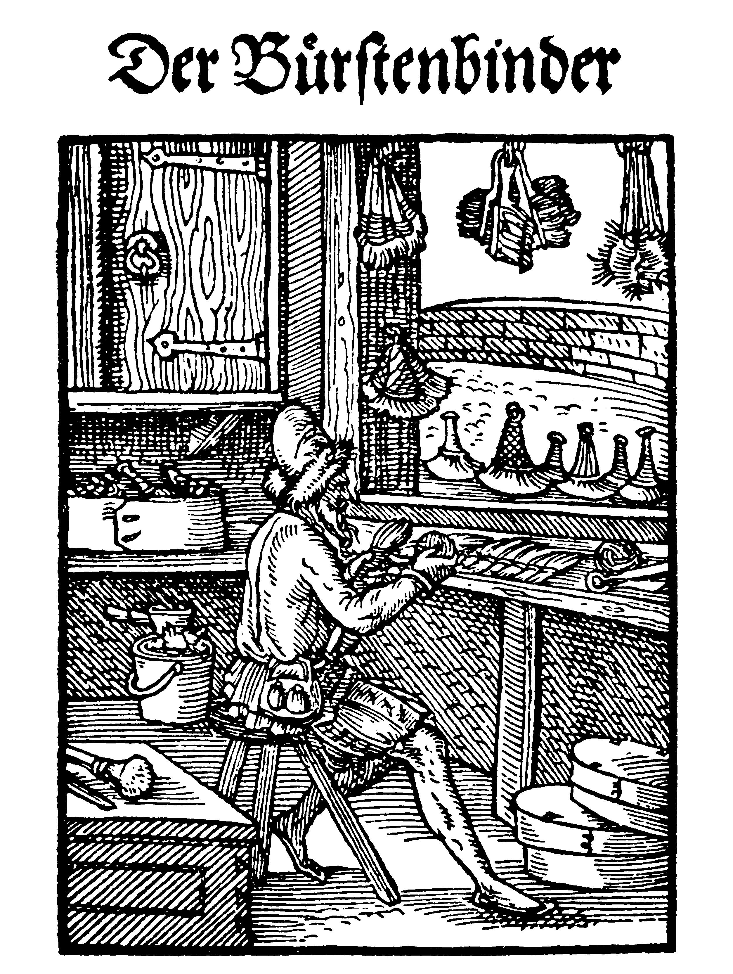 Der Bürstenbinder, Holzschnitt aus Jost Ammans Ständebuch von 1568